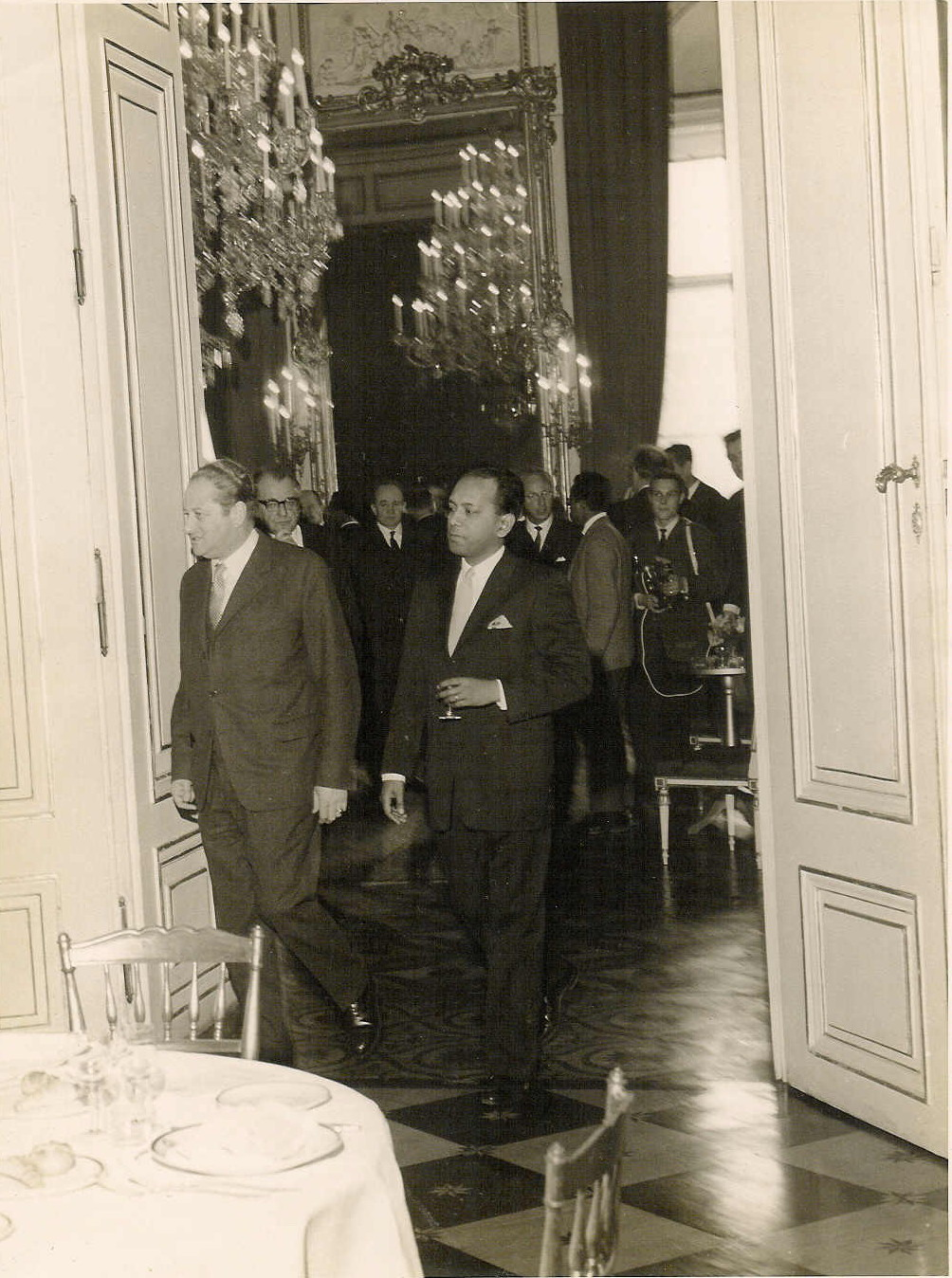 Austrian Foreign Minister Bruno Kreisky with Abul Fateh, in Vienna